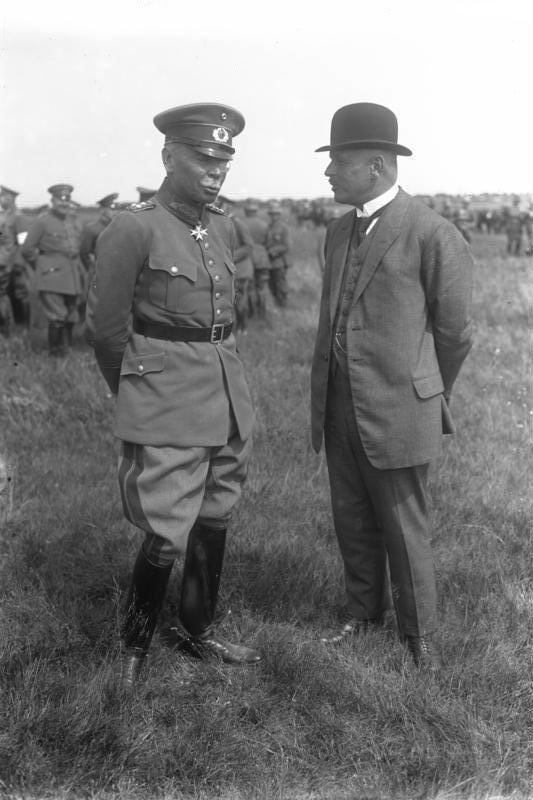 Die großen diesjährigen Kavallerie-Manöver in Döberitz bei Berlin! Reichswehrminister Dr. Gessler und General von Seeckt wohnten den Manövern bei. Anschliessend an das Manöver fand ein Vorbeimarsch der Truppen statt. Reichswehrminister Dr. Gessler (rechts) und General von Seeckt (links) im Manövergelände. [Text Neuherausgabe Dez. 1930:] 10 Jahre deutsche Reichswehr! Am 1. Januar 1931 werden es 10 Jahre, dass die deutsche Reichswehr neu geschaffen wurde. Verdienstvolle Förderer der neuen deutschen Reichswehr. Links der ehemalig langjährige Chef der Heeresleitung General von Seeckt und der ehemalige Reichswehrminister Dr. Gessler (rechts).